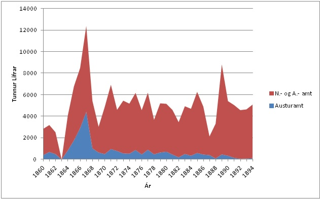 Hákarlaveiðar Norðlendinga og Austfirðinga